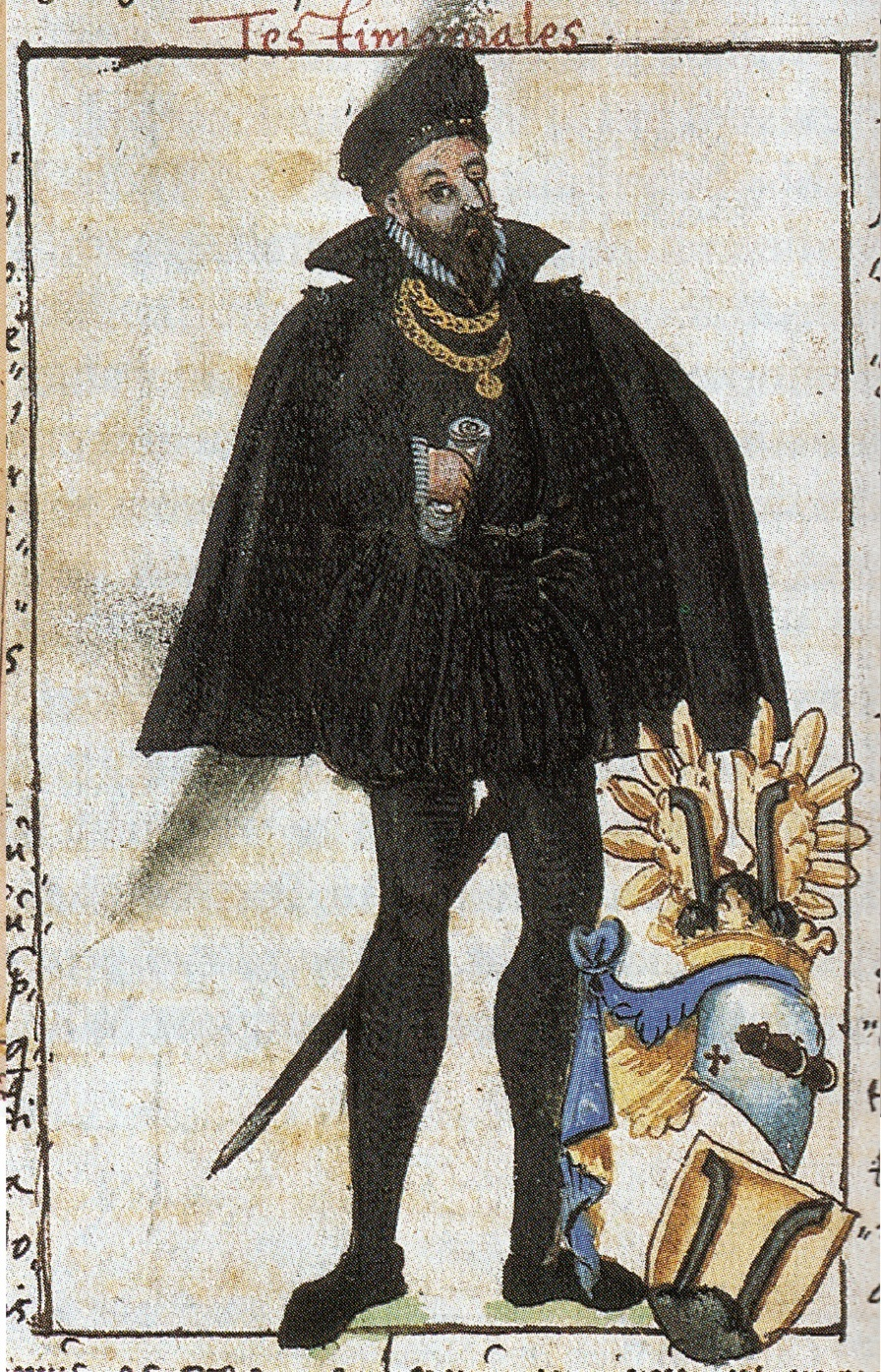 Doctor Johan Thoman Eisenberger